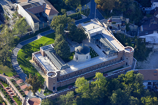 Gül Baba türbéje a levegőből, Budapest